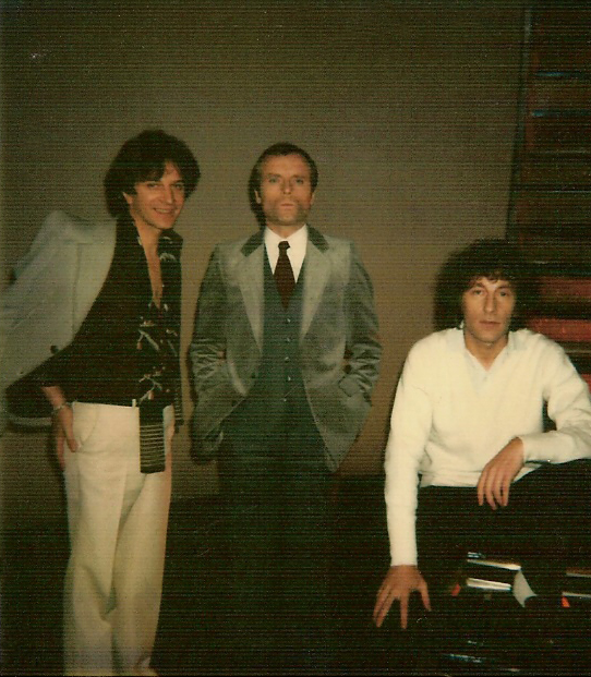 Dans les Studios de TF1 lors des éliminatoires du concours de chant des « Découvertes TF1 ». De gauche à droite : René-Louis Baron (lauréat), Pierre Douglas (présentateur) et Alain Souchon (invité).